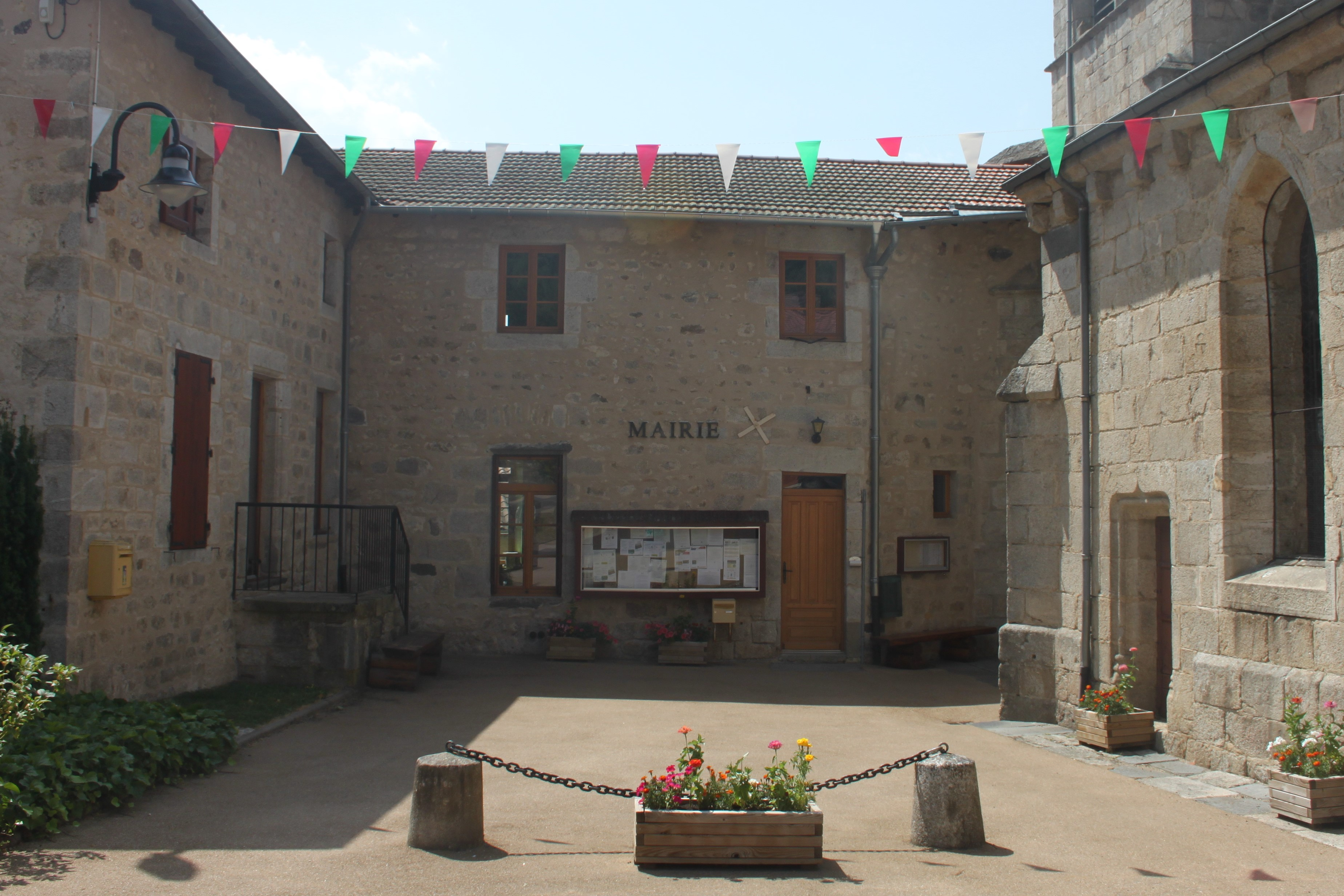 Mairie de Saint-Martin-des-Olmes